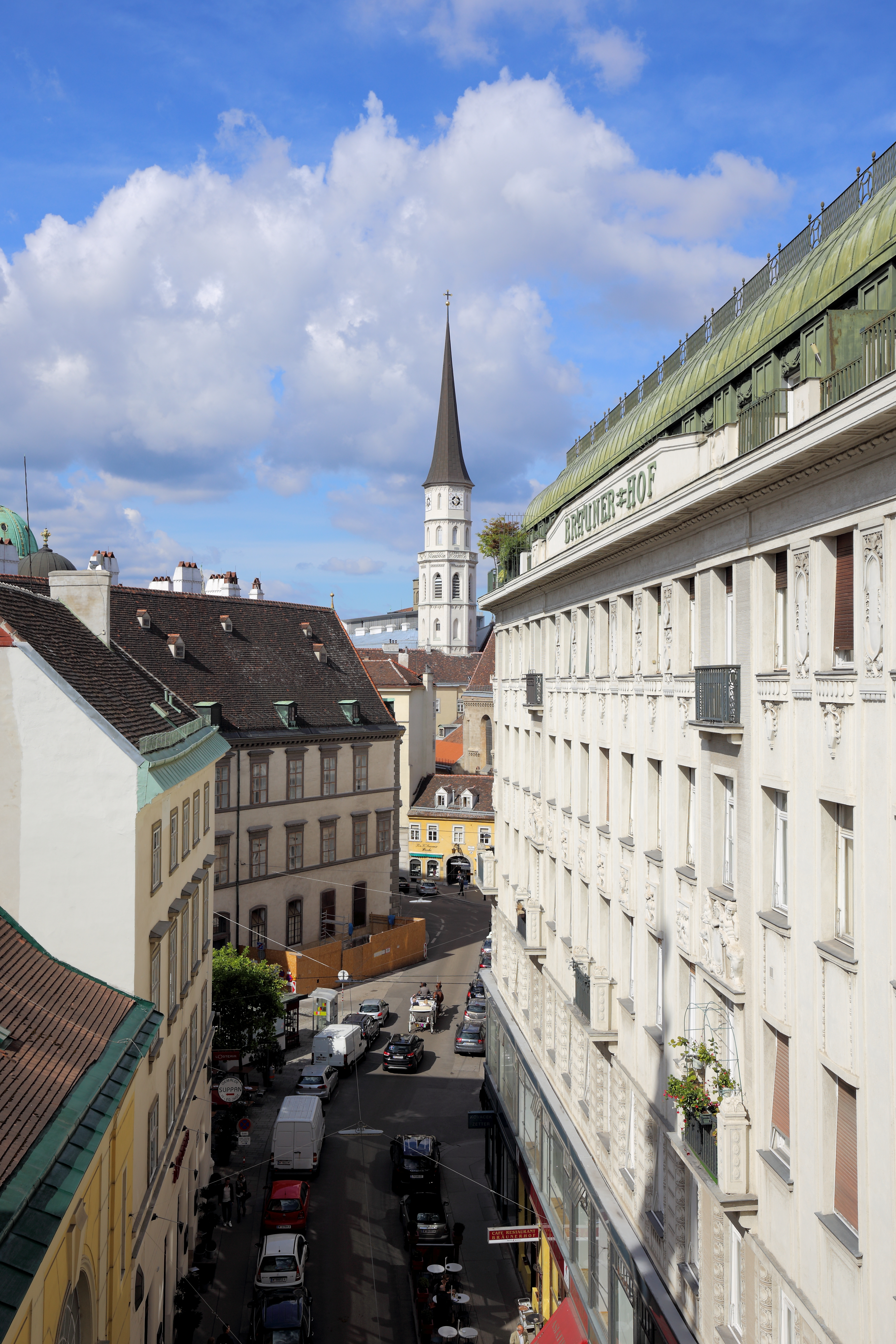 Die Stallburggasse, Richtung Habsburgergasse gesehen, im 1. Wiener Gemeindebezirk Innere Stadt.Rechts der Bräunerhof und in der Bildmitte der Turm der Michaelerkirche. Links unten im Bild die Evangelische Kirche H.B., dann ein Wohnhaus und anschließend die Stallburg.